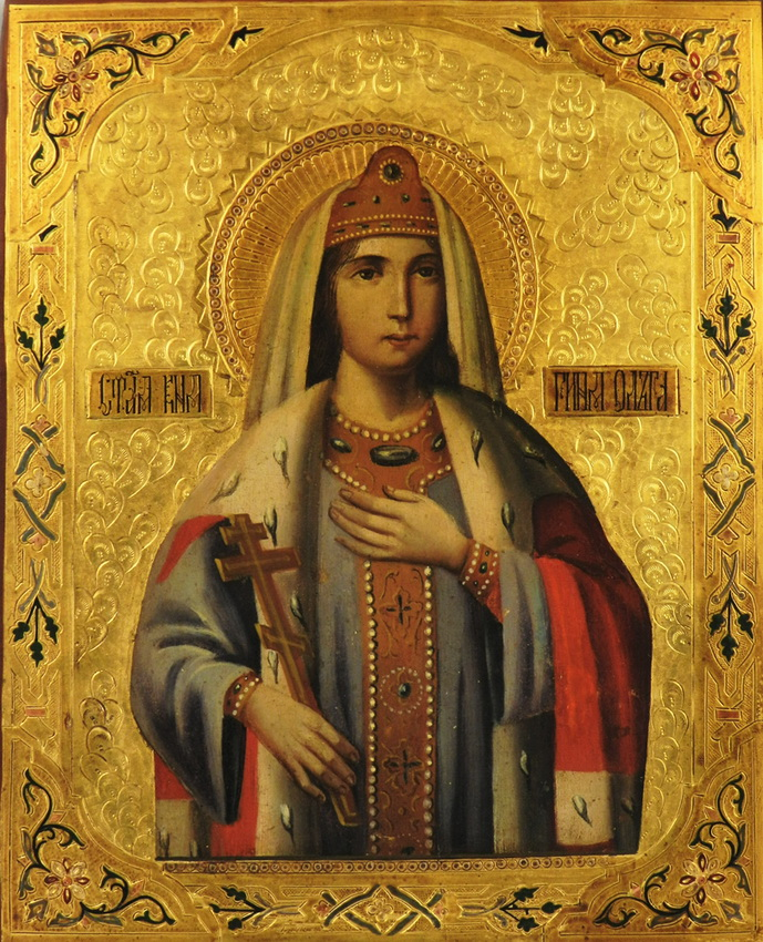 Икона "Св. Ольга". Россия, конец XIX в.